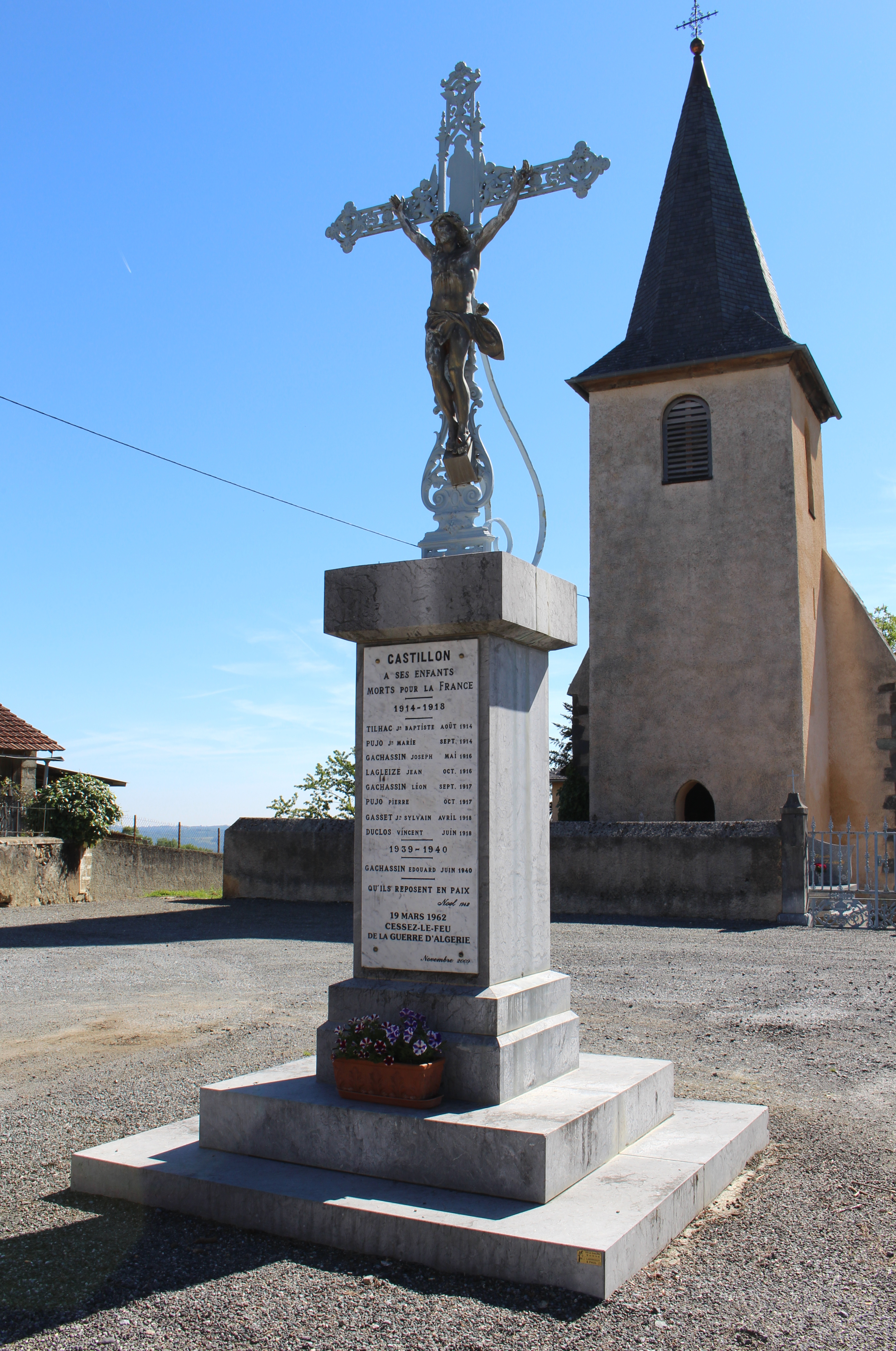 Monument aux morts de Castillon (Hautes-Pyrénées)